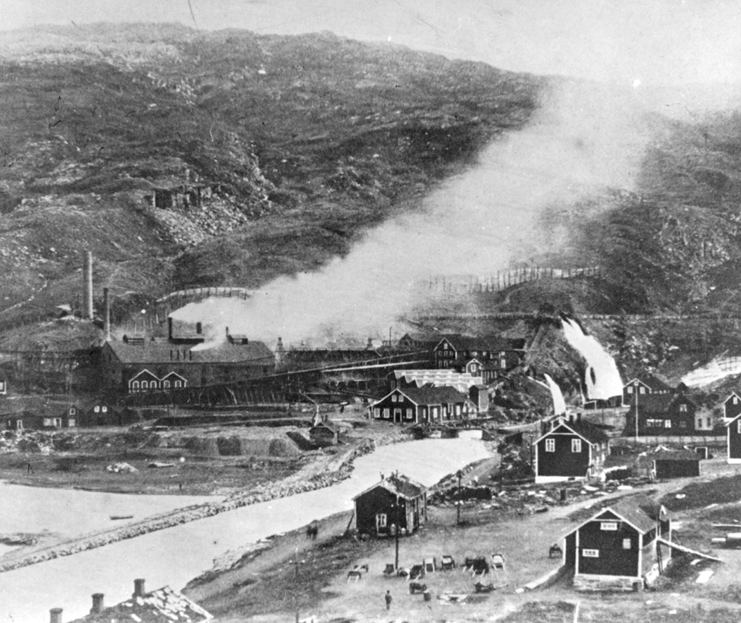 Smeltehytta i Fagerli med nærmeste bebyggelse. ca 1900 NM.F.008477-00001